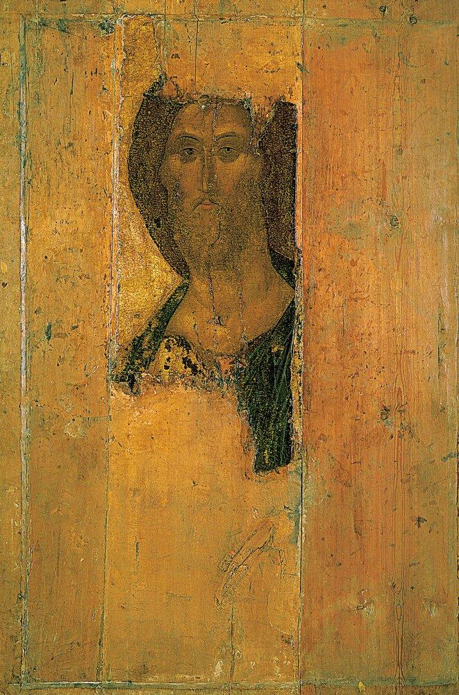 Спас